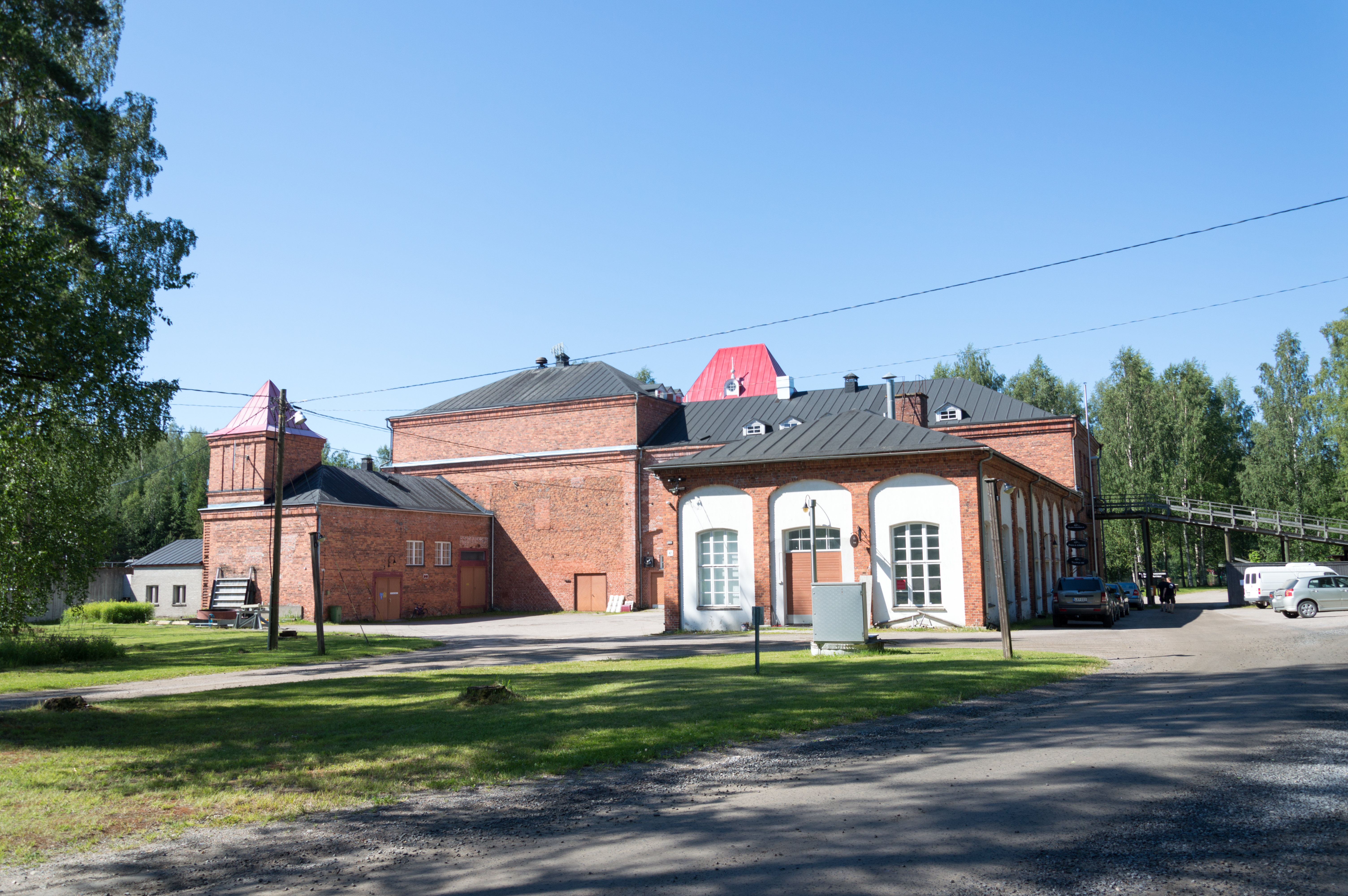 Kissakosken tehdasmiljöö Hirvensalmella